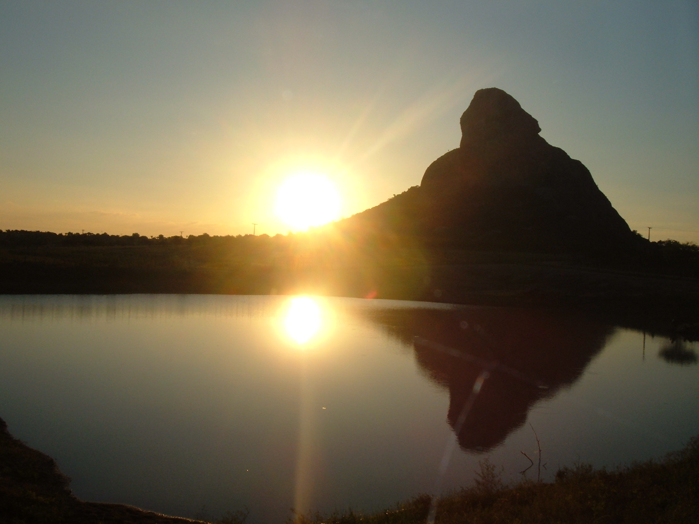 Imagem de Pé de Serra, Bahia.